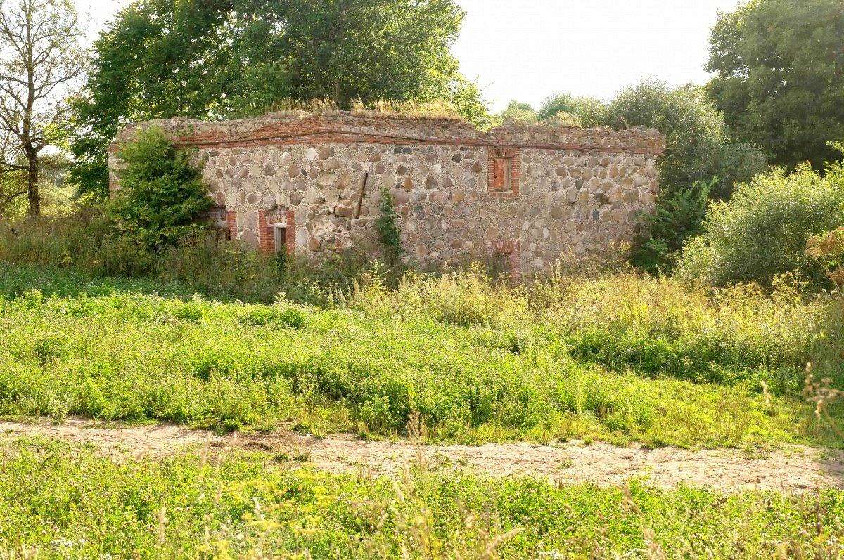 Папшычы. Рэшткі млына